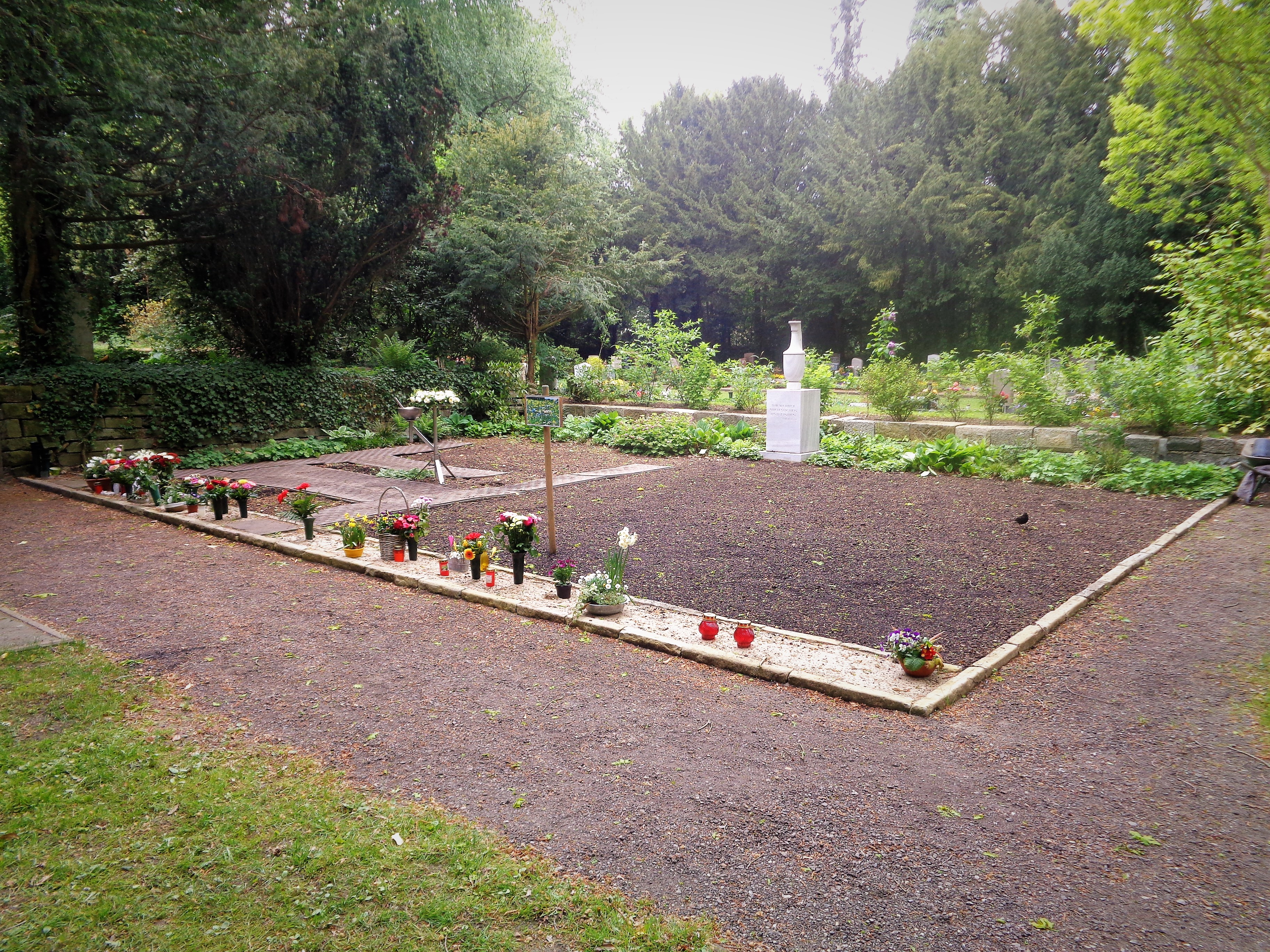 Ein Urnenfeld auf dem Parkfriedhof Eichhof in Kronshagen. Hier ist es möglich, Urnenbeisetzungen in anonymisierter Form durchzuführen; das heißt, es gibt nach der Zeremonie keinen Hinweis auf die bestattete Person. Letzte Grüsse wie Blumen oder ähnliches können auf dem Kiesstreifen im Vordergrund abgelegt werden.